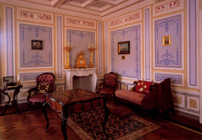 Гостиная в Ольгином павильоне